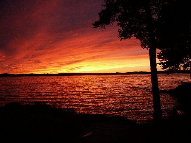 Winnipesaukee Sunset 08-28-2002 JJH JohnJHenderson